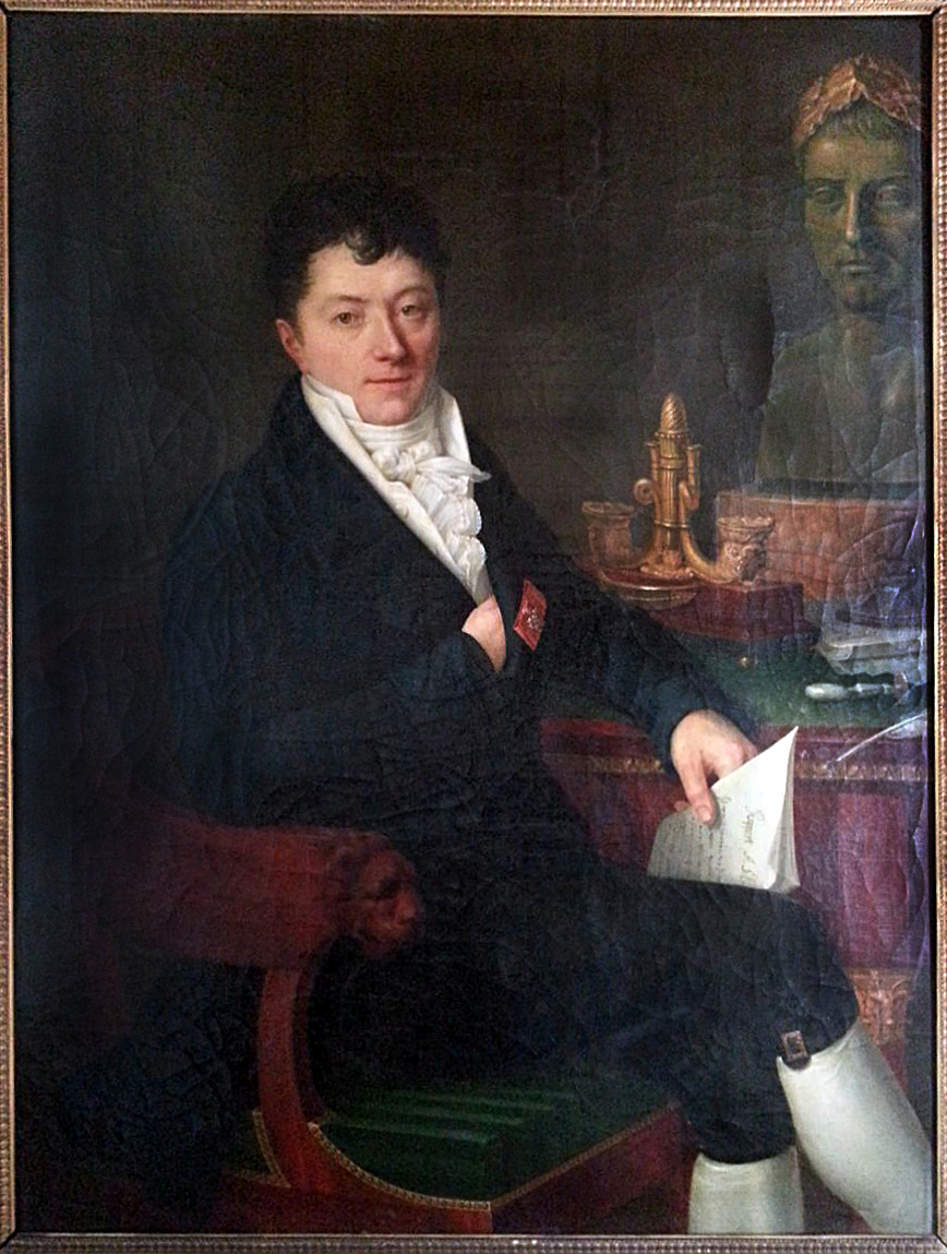 Portrait de l'aïeul Pierre-Marie Desmarest par Edouard Cibot. Crédit photo : Arnauld et Jordan Lamorlette 2013 (Collection privée Desmarest-Cibot-Lamorlette)